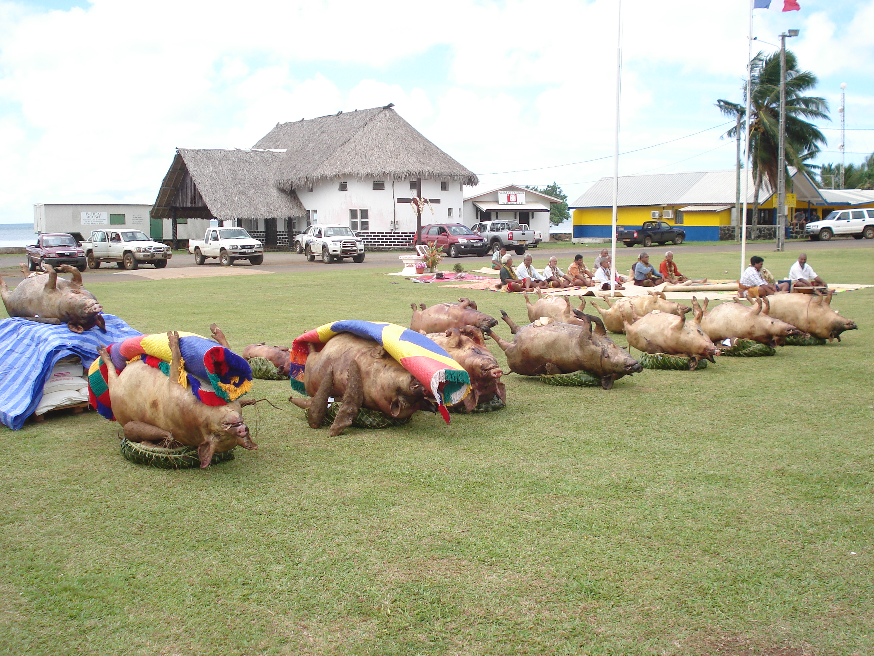 Lea faka-Tonga: puaka kau hamolua